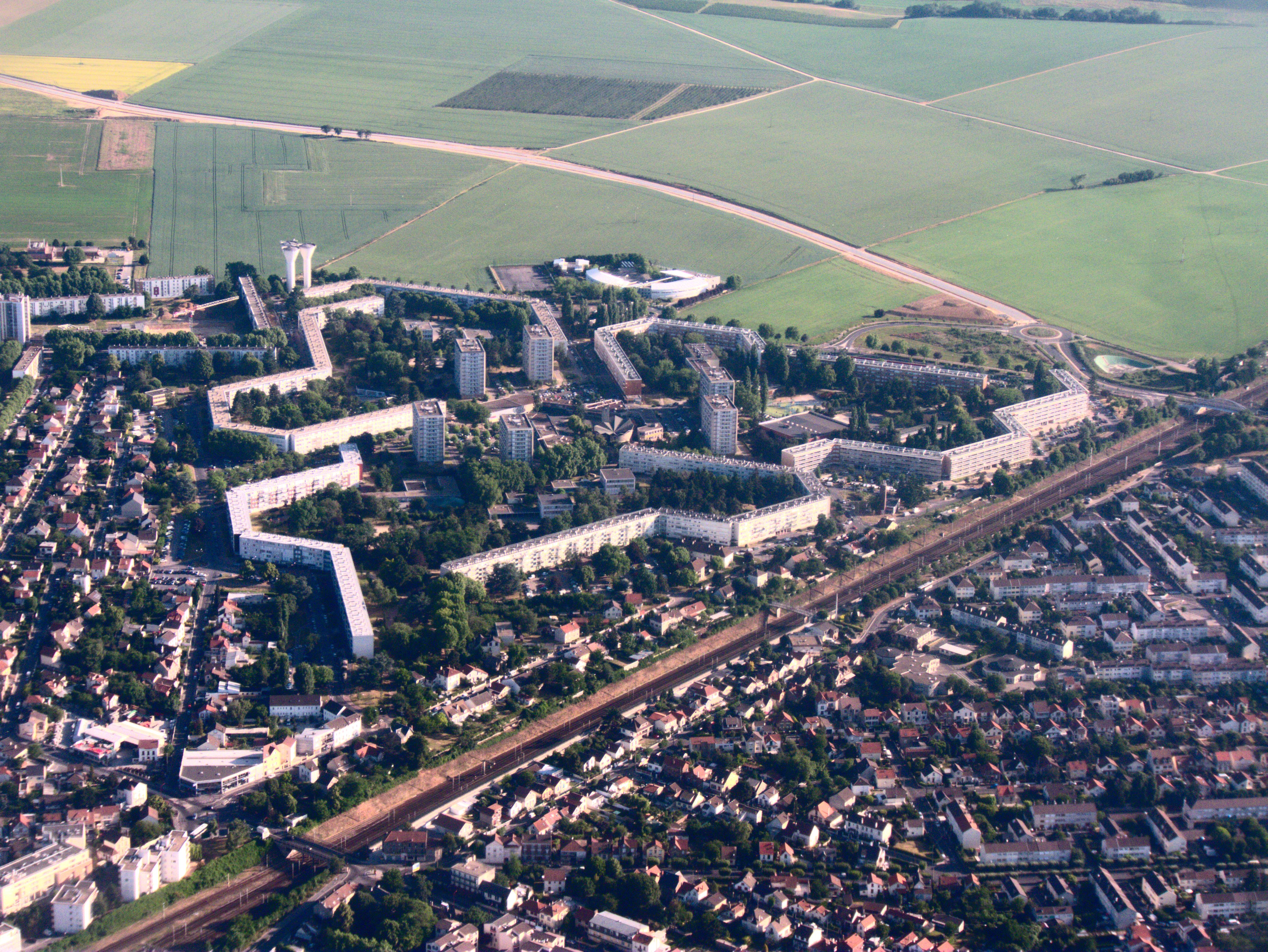 Le quartier de la Fauconnière et la ligne de Paris-Nord à Lille, à Gonesse, Val-d'Oise, France.